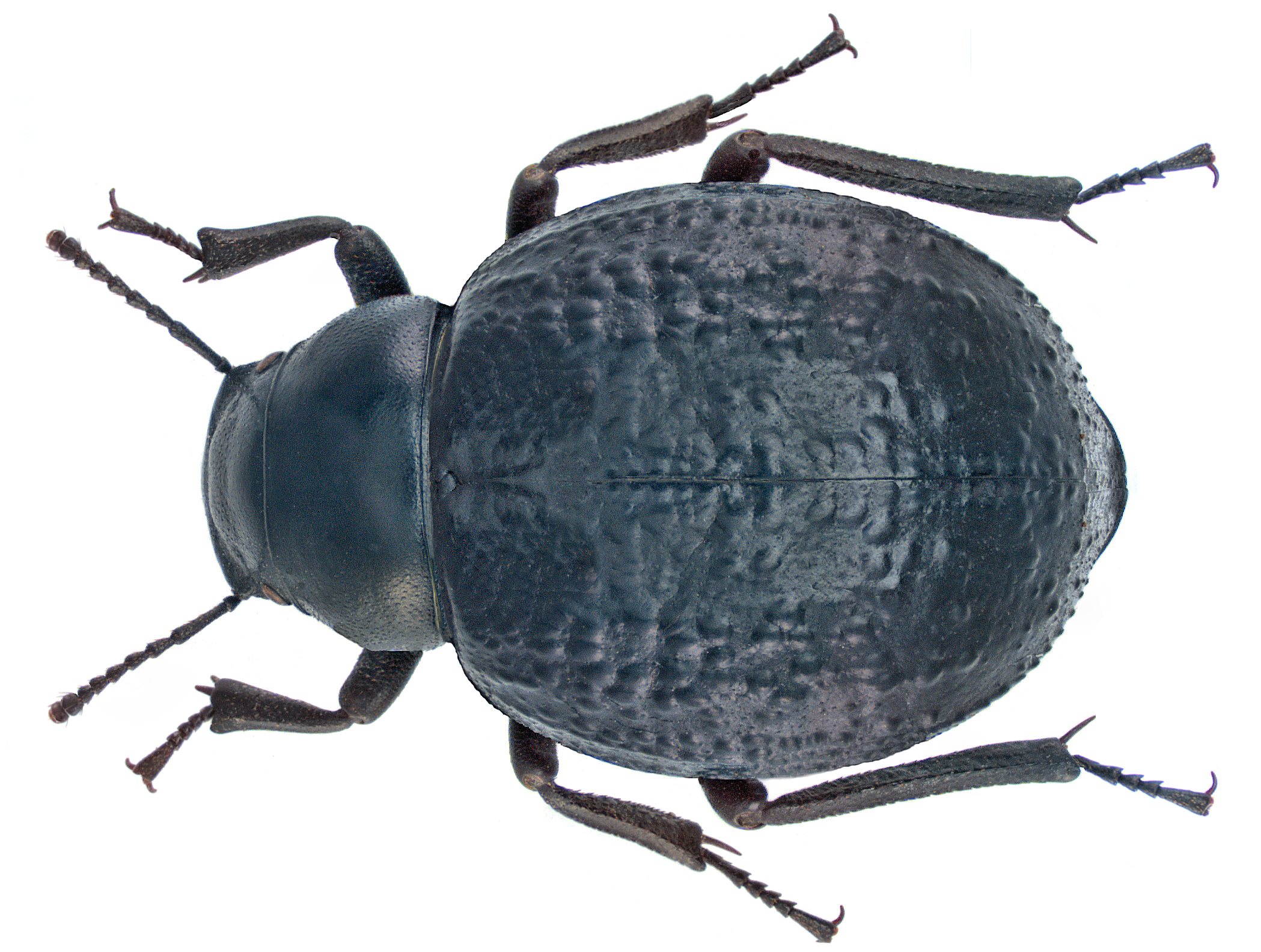 Family: Tenebrionidae Size: 16,8 mm Location: Greece, Katerini, Limmin Litochoron, Dion Palace Hotel leg. J.Schoenfeld, 21.VI.-28.VI.2008; det. Schawaller, 2009 Photo: U.Schmidt, 2014